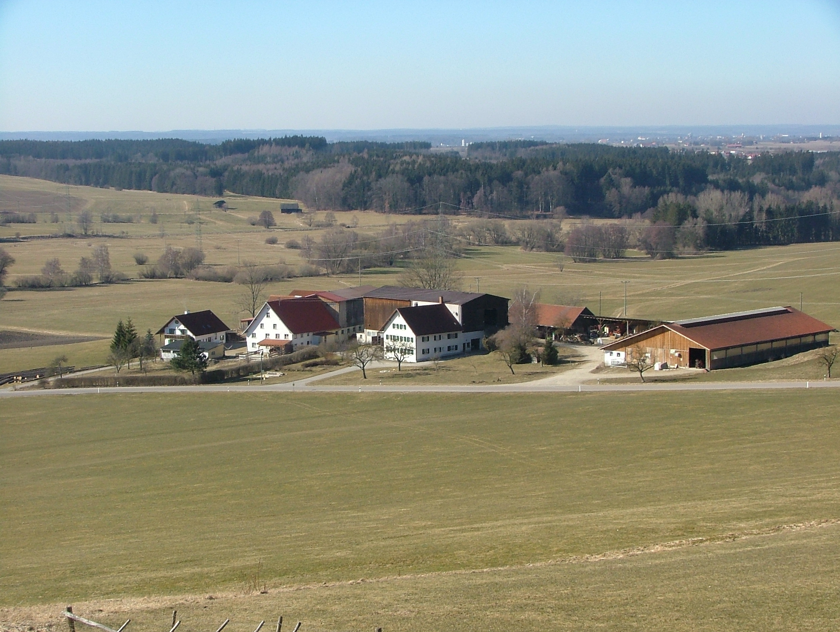 Ottobeuren Einöde Fröhlins Entferntes Wasserzeichen: R.M.